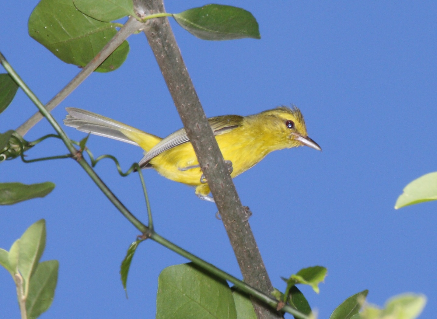 Golden Vireo (Vireo hypochryseus)